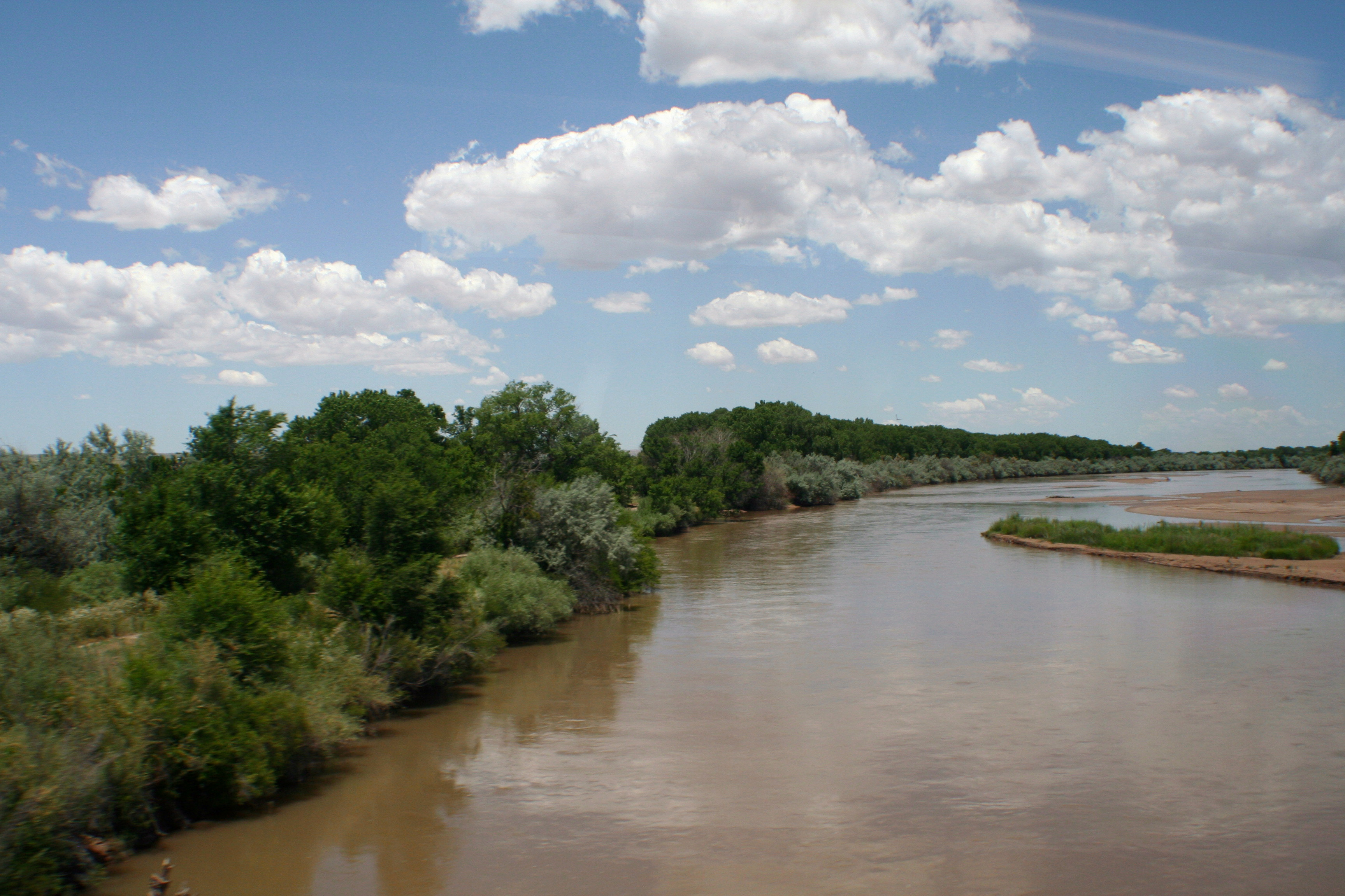 Rio Grande River Bed near Albuquerque